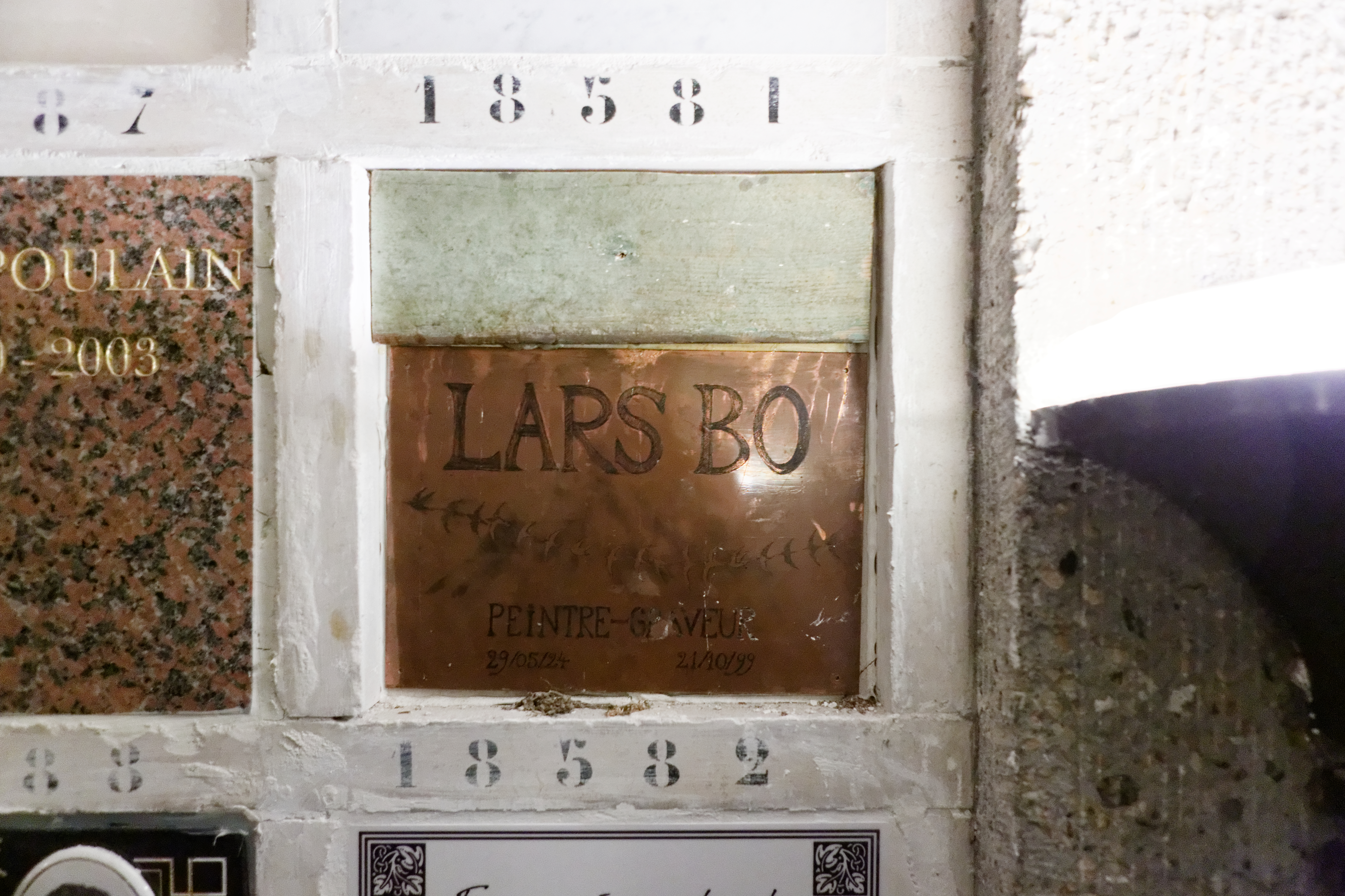 Sépulture de Lars Bo (1924-1999), peintre, graveur et écrivain danois. Il est surtout connu pour son œuvre graphique aux motifs d'inspiration parfois proches du surréalisme.